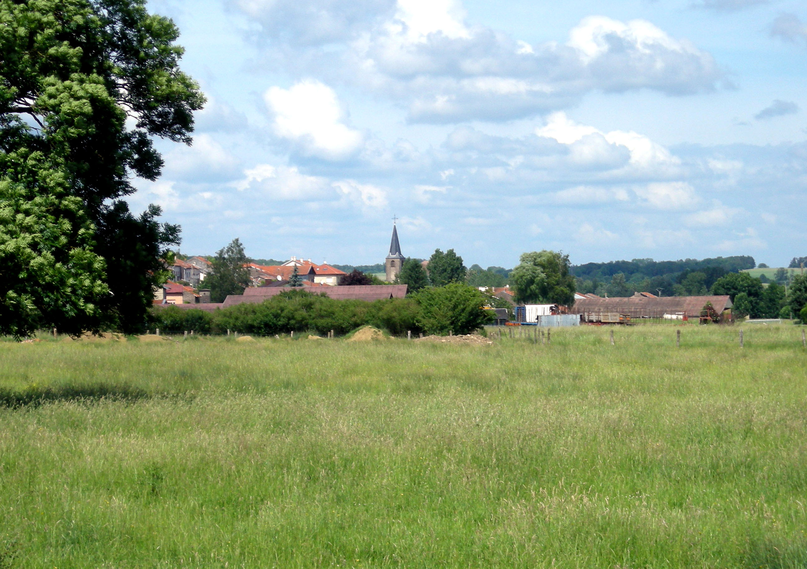 Vue générale de Glonville (Meurthe-et-Moselle), en venant de Fontenoy-la-Joûte